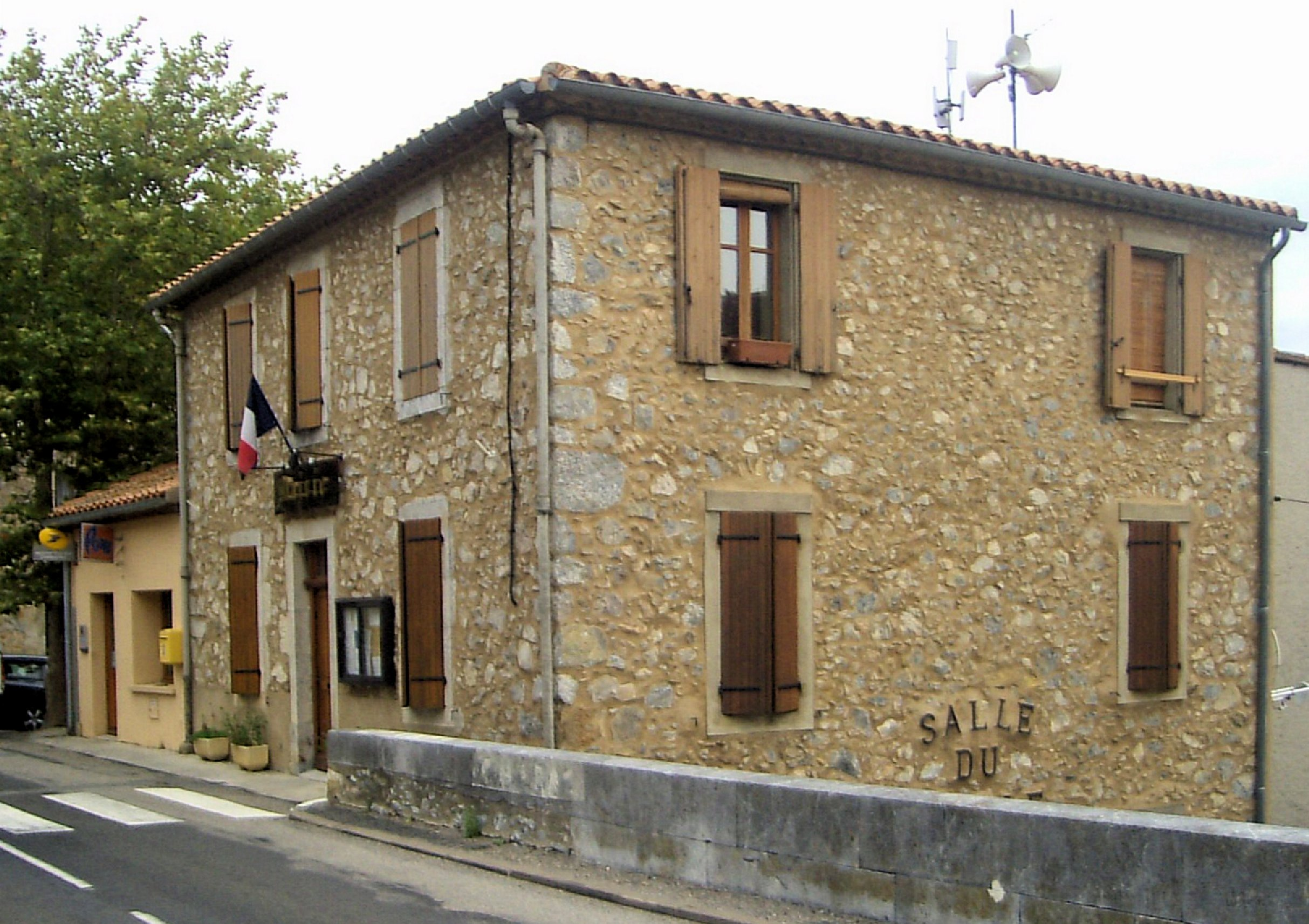 La mairie de Félines-Termenès